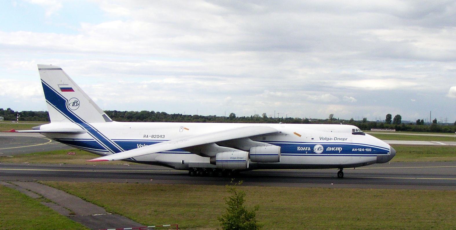 plane